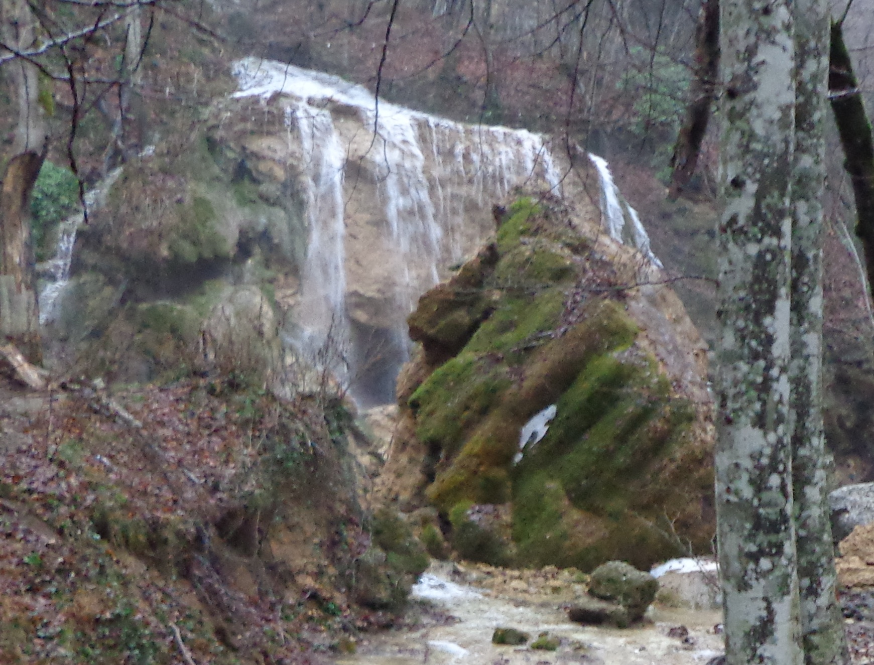 обломок консольной части водопада